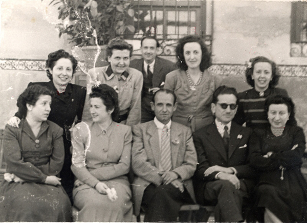 Foto de grupo. Isabel Clarisa Millán García (segunda por la derecha de la fila superior) y Felipa Niño Más (primera a la izquierda de la fila inferior). Número de inventario: FD00321.